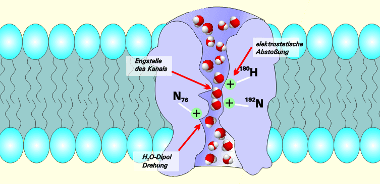 Schemazeichnung eines AQP-Kanals